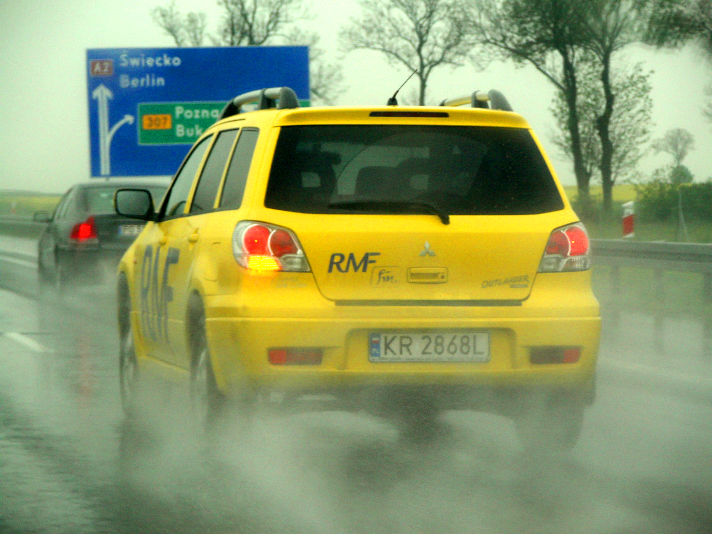 Wóz reporterski radia RMF FM na autostradzie A2 pod Poznaniem